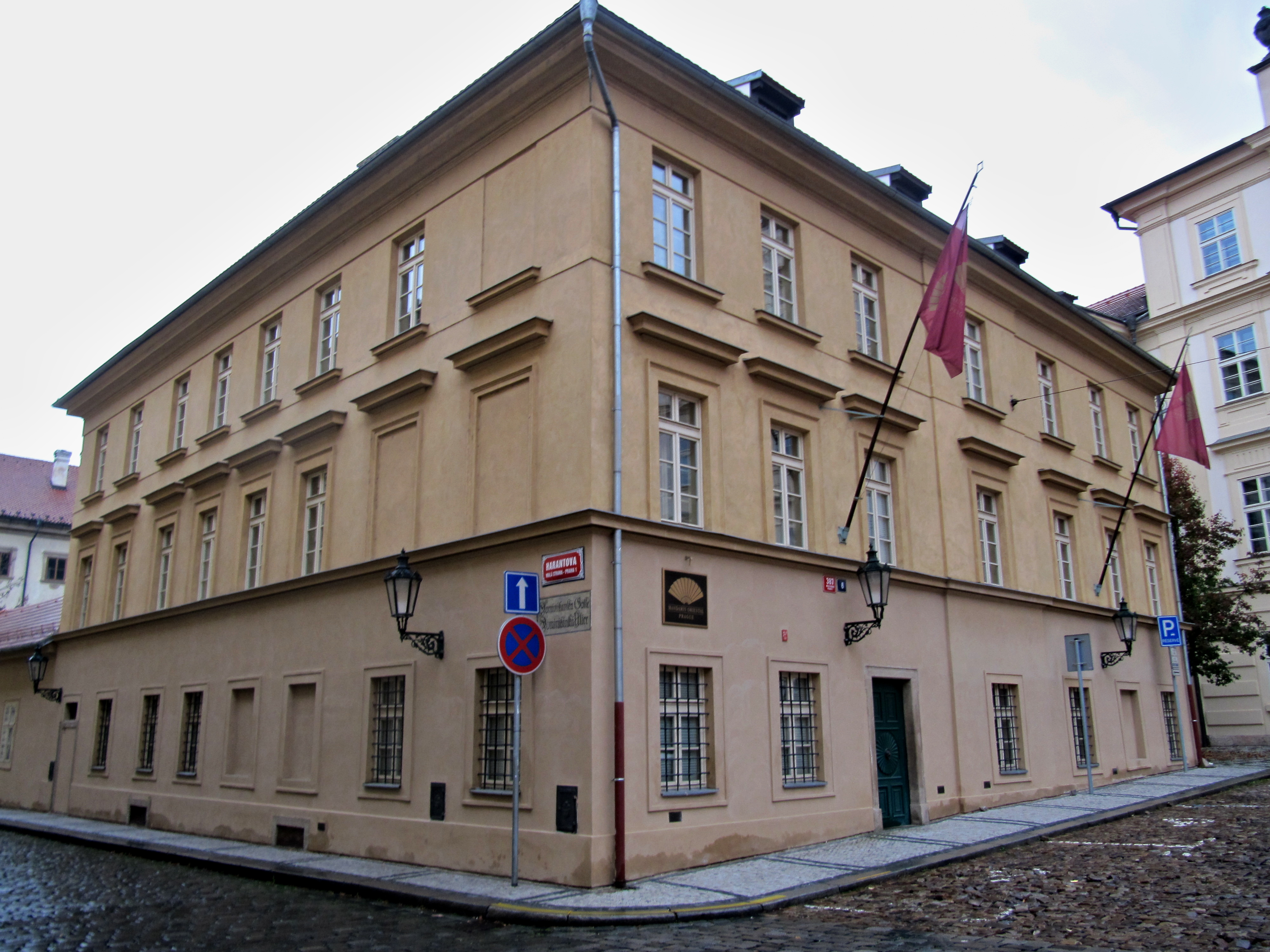 Klášter dominikánů/magdalenistek (Malá Strana), Praha 1-Malá Strana, Karmelitská 387/6, Harantova 387/1